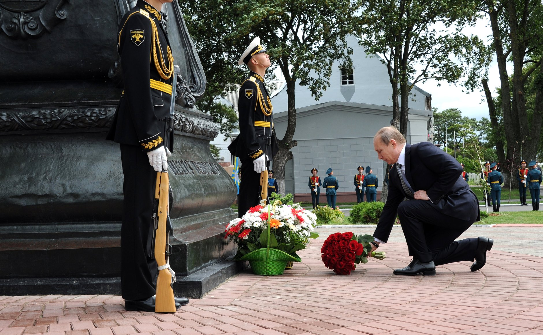 Президент России Владимир Путин на Дне Военно-Морского Флота России в Балтийске. Возложение цветов к памятнику Петру Первому